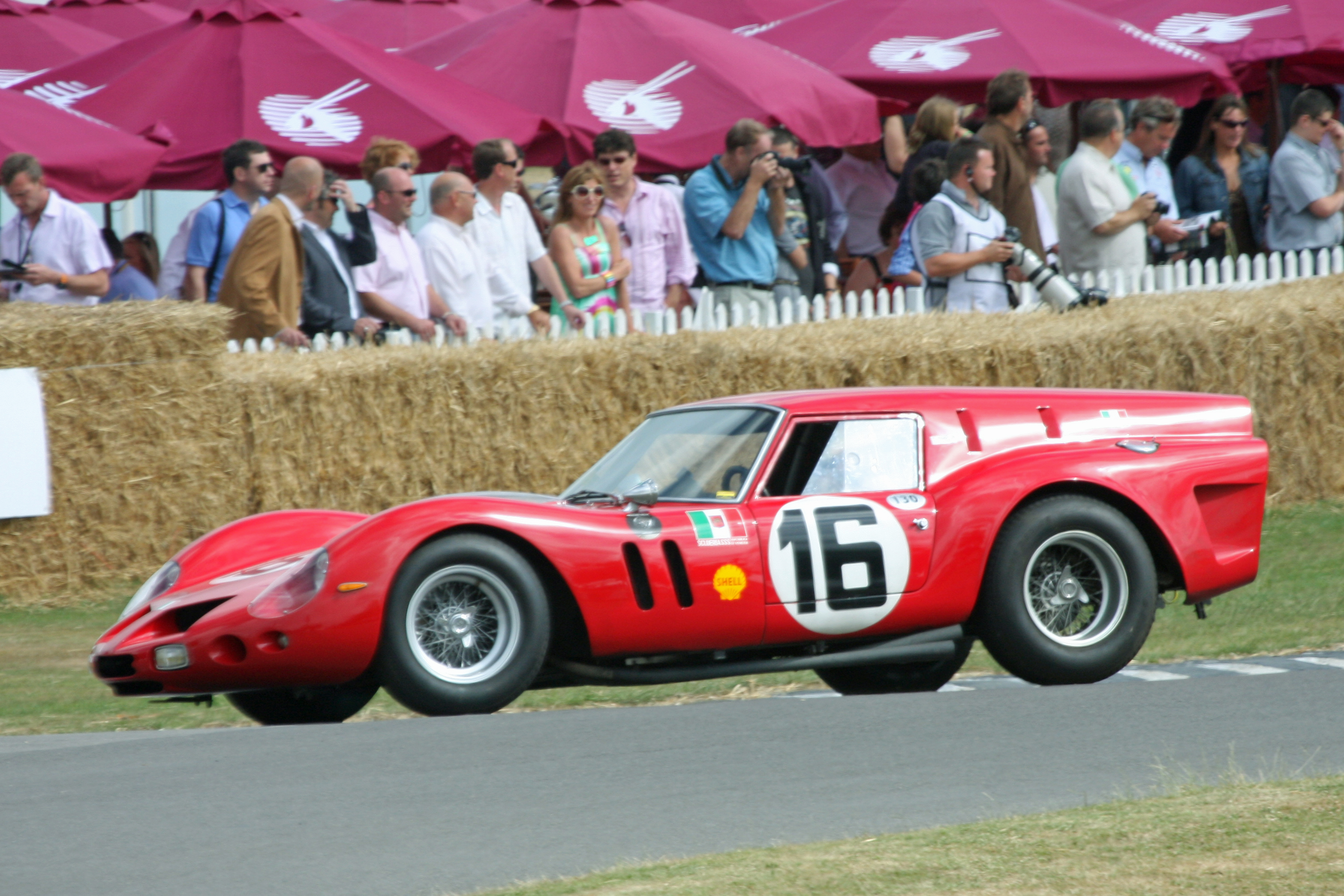 Goodwood 2009